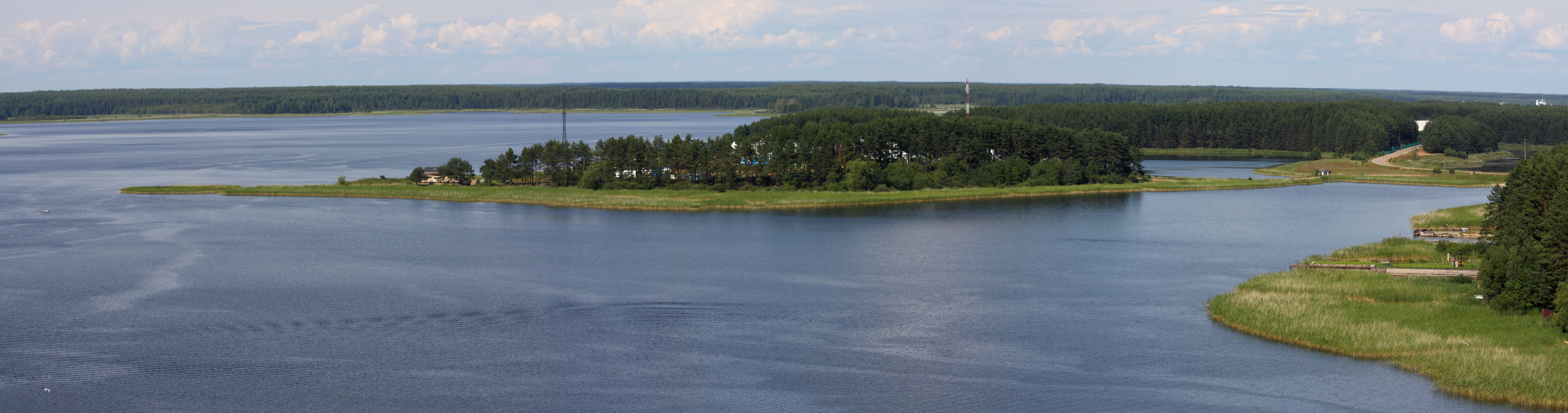 Озеро Селигер, полуостров Каменный Крест. Снимок сделан с колокольни Богоявленского собора Нило-Столобенской пустыни